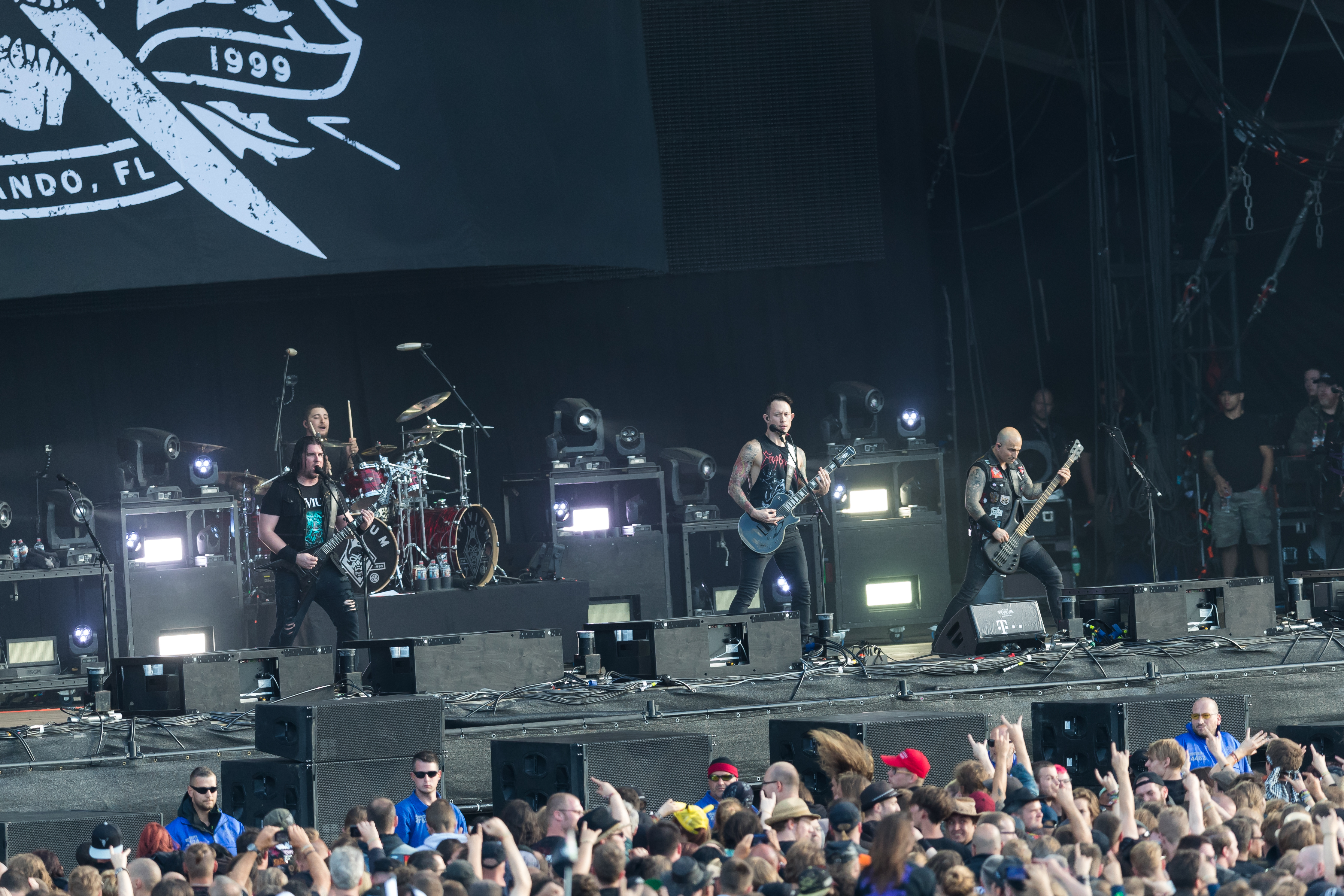 Trivium during Wacken Open Air at Schleswig-Holstein, Wacken, , Germany on 2017-08-04, Photo: Sven Mandel